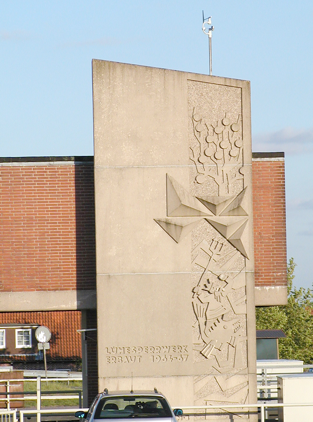 Stele am Lühesperrwerk, Künstler: Heinz Meyer-Bruck (1927-1997)